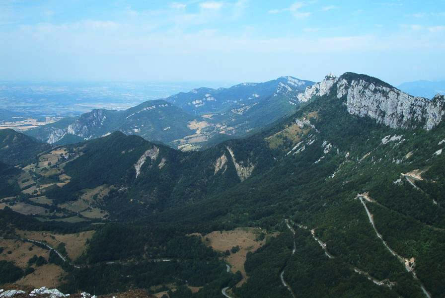 Route de Tourniol